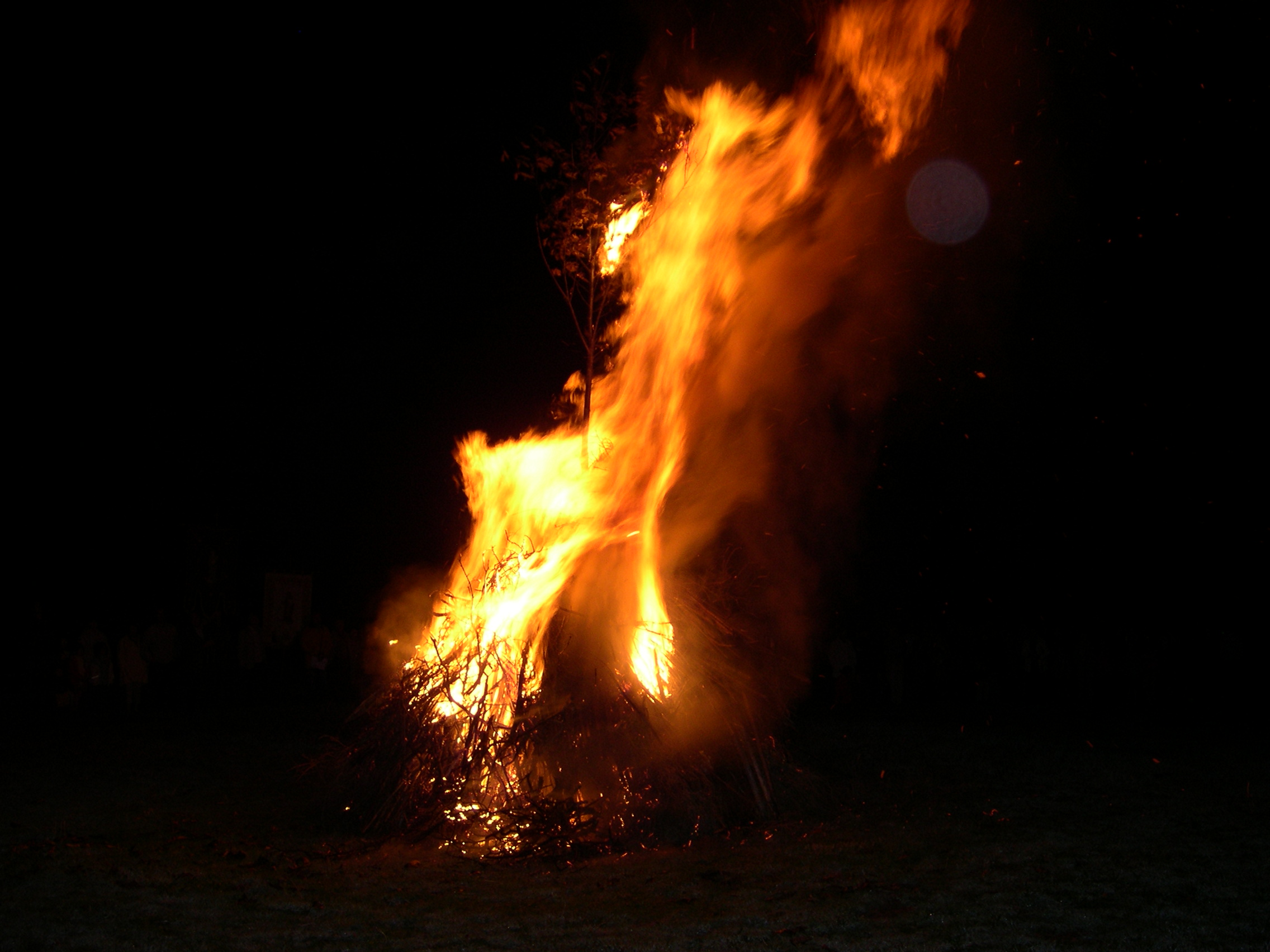 Tantad Pardon Bulad 2009